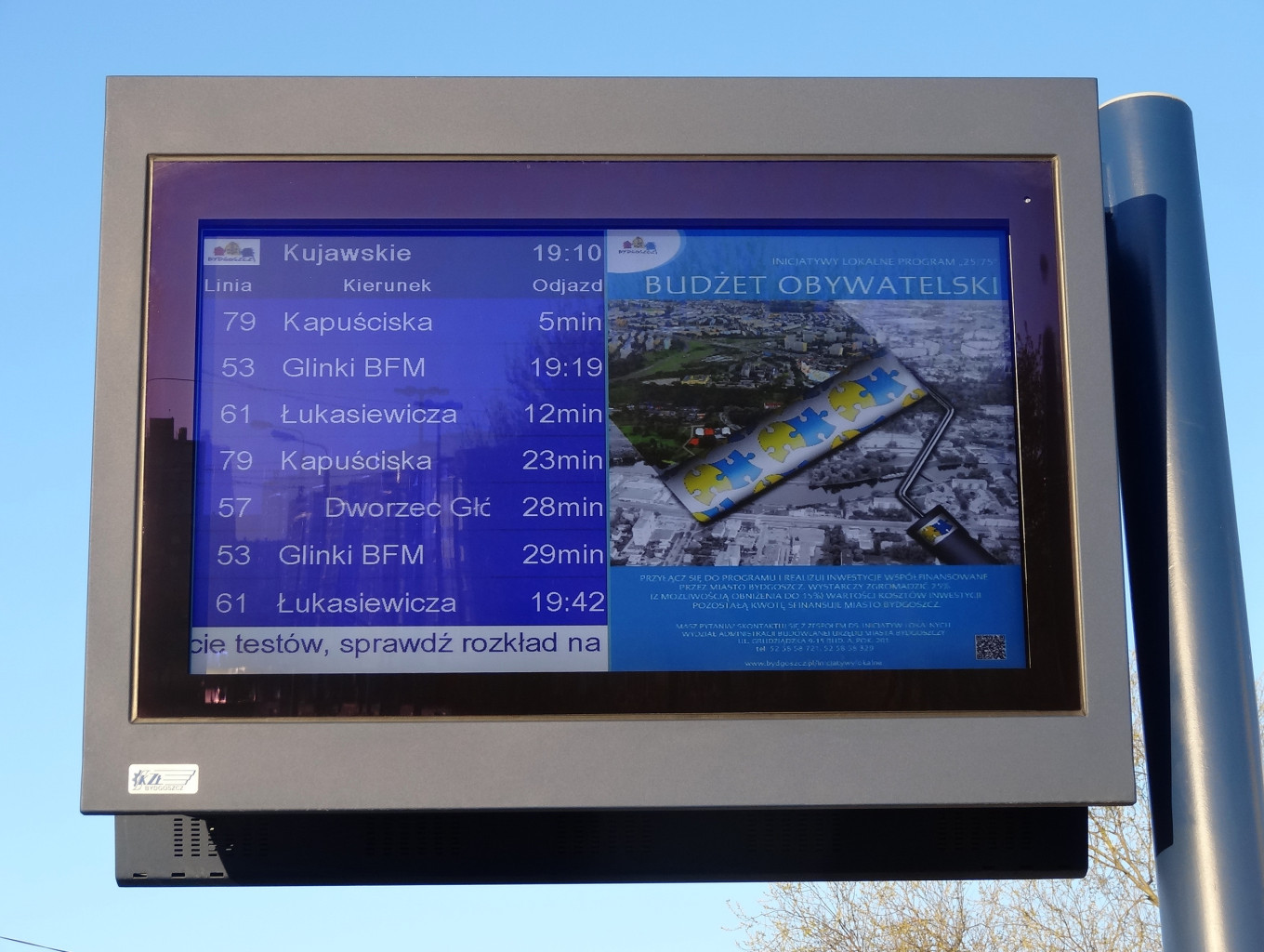 System Informacji Pasażerskiej w Bydgoszczy - monitor diodowy, przystanek autobusowy przy al. Wojska Polskiego